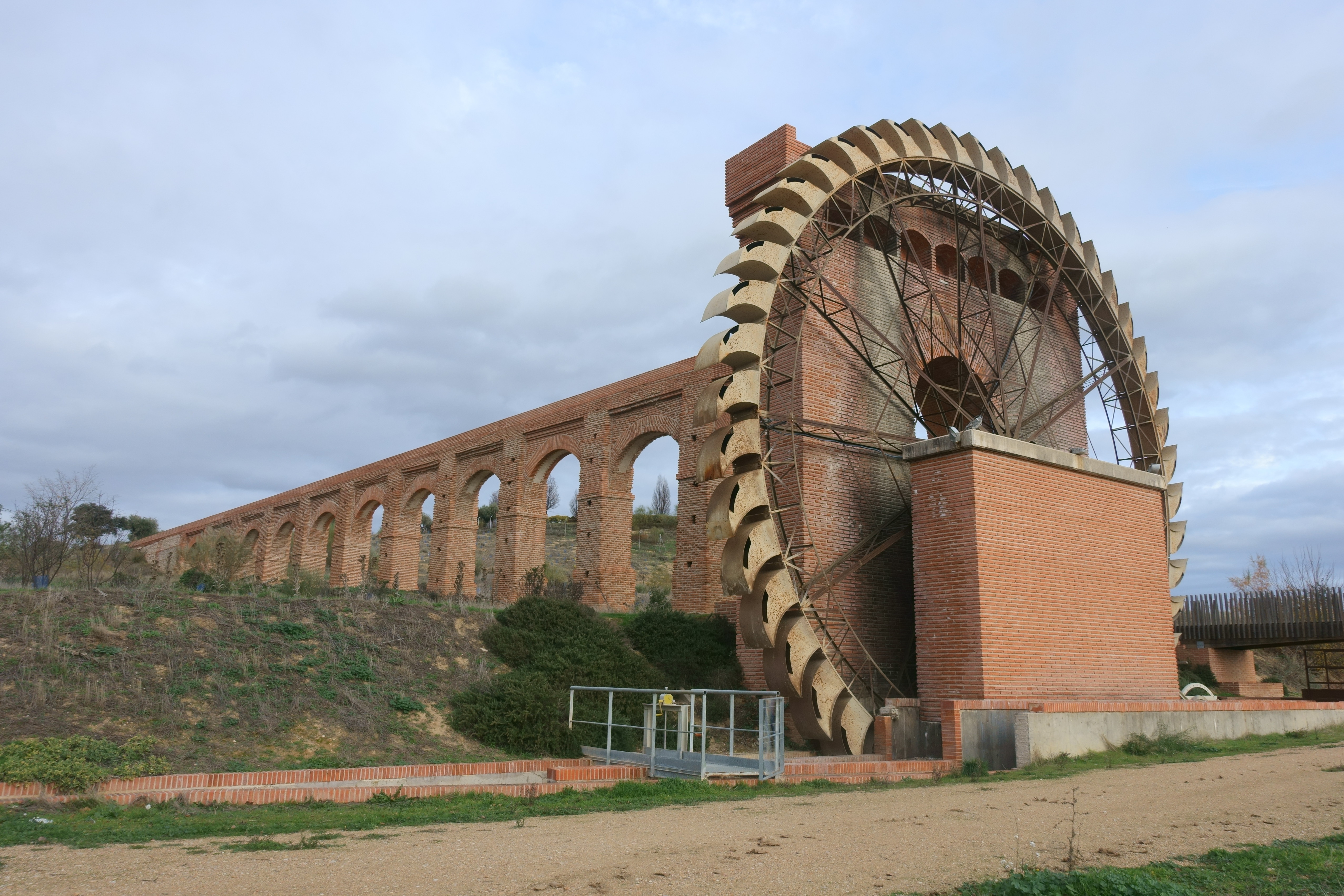 Azuda y acueducto de la Montaña, en Aranjuez (Madrid, España).